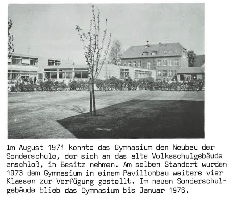 Im August 1971 konnte das Gymnasium den Neubau der Sonderschule beziehen.